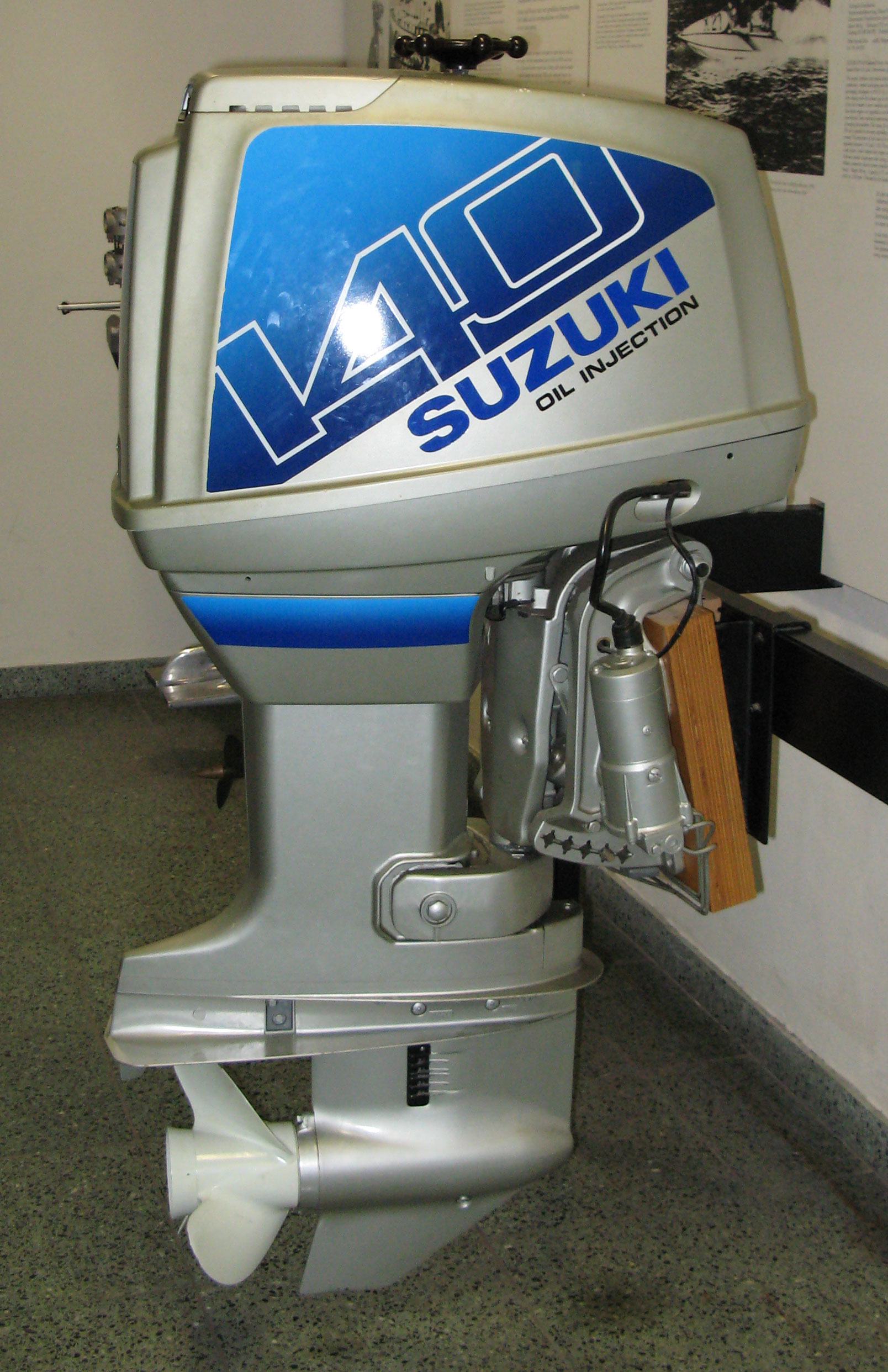 140PS Außenbordmotor von Suzuki Aufnahme aus dem Deutschen Museum in München